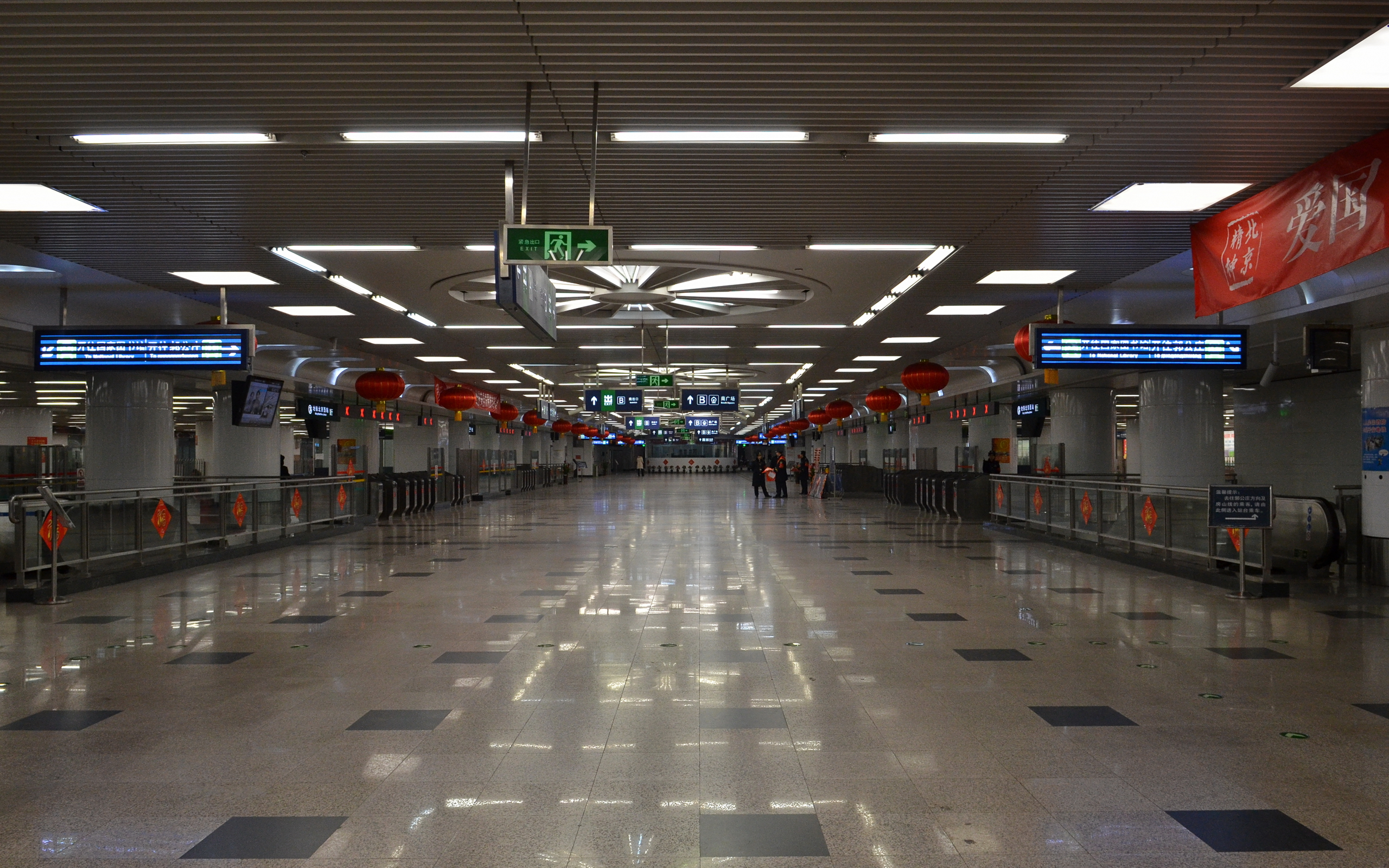 中文（中国大陆）: 北京西站地下的地铁站站厅